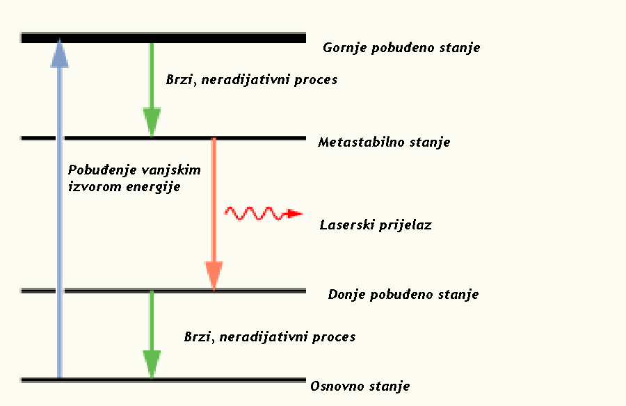 Princip rada četverosupanjskog lasera. Sustav se pobuđuje u pobuđeno stanje (plavo) odakle se relaksira u metastabilno stanje (zeleno), odakle, laserskim prijelazom prelazi u neko, niže, pobuđeno stanje (crveno). Iz tog stanja, sustav se vraća u osnovno stanje (crveno).